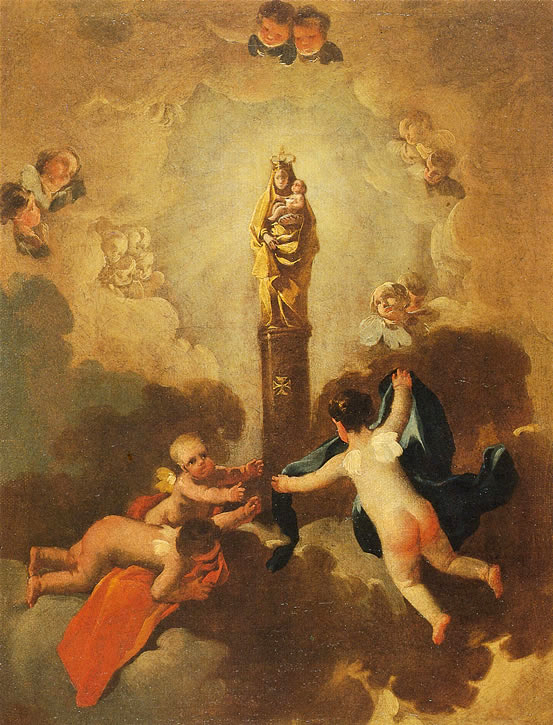 La obra representa a la Virgen del Pilar, patrona de Spain.